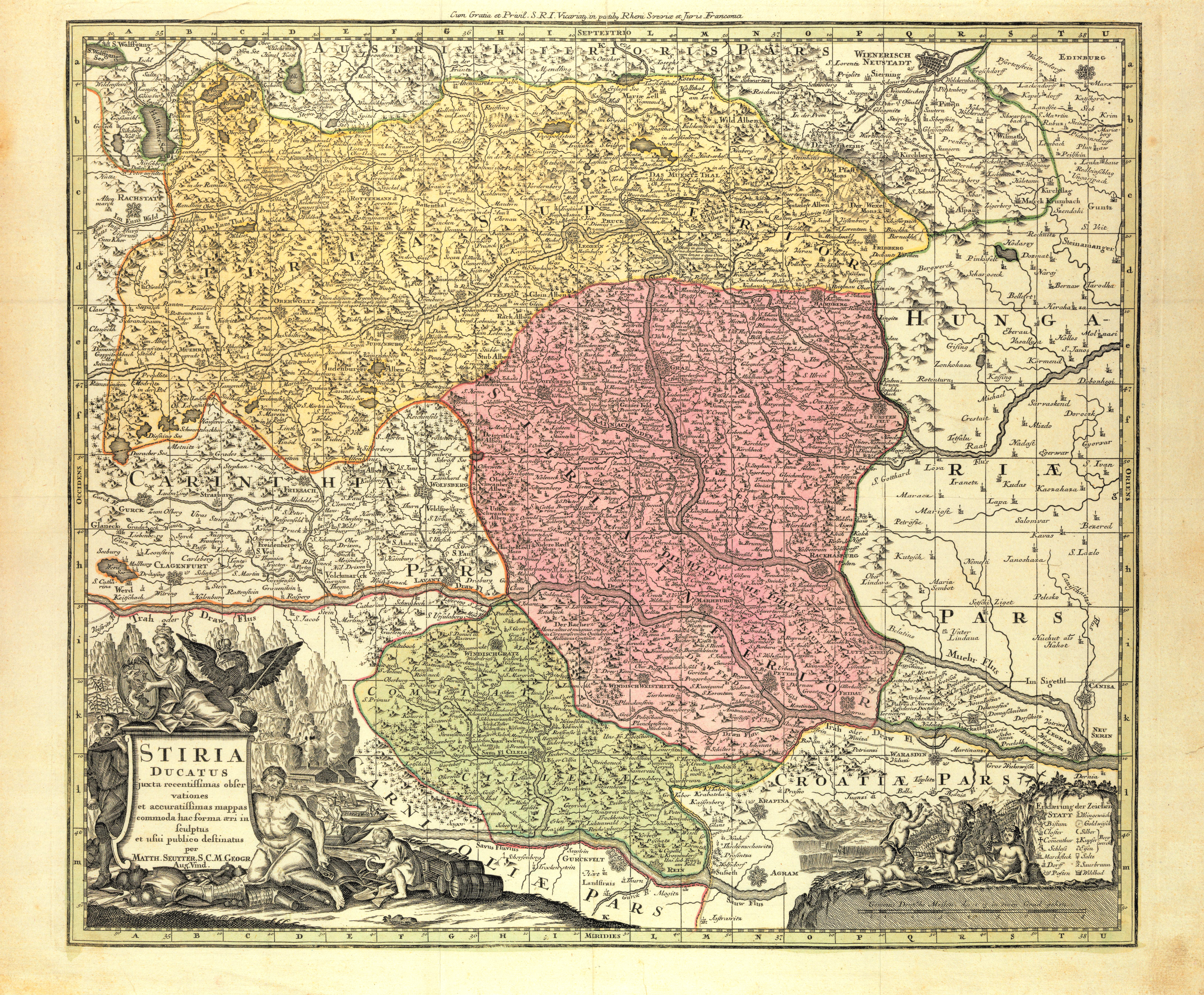 historische Landkarte: Matthäus Seutter, Landkarte des Herzogtums Steiermark, Augsburg-Wien 1728. Gliederung in Obersteiermark, Untersteiermark (ab südlich Frohnleiten, mit Voitsberg und Hartberg) und Grafschaft Cilli.